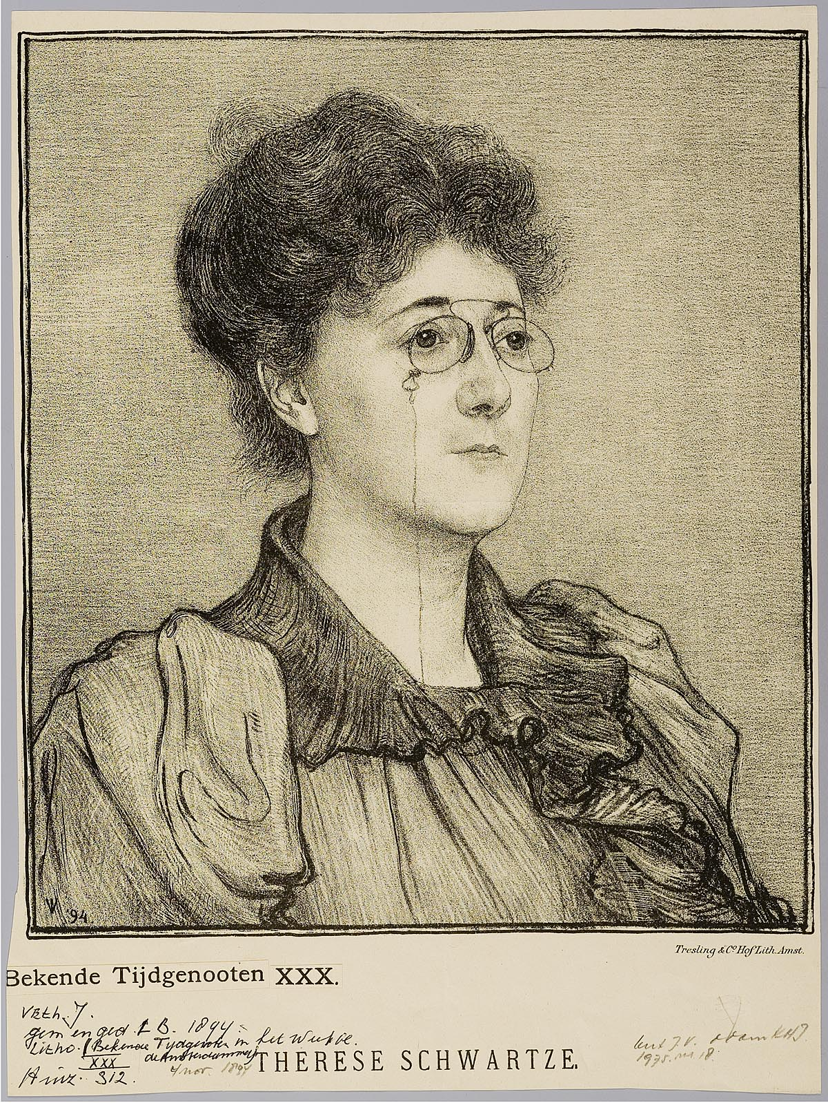 Portret van kunstenaar Thérèse Schwartze (1894), gemaakt door Jan Veth